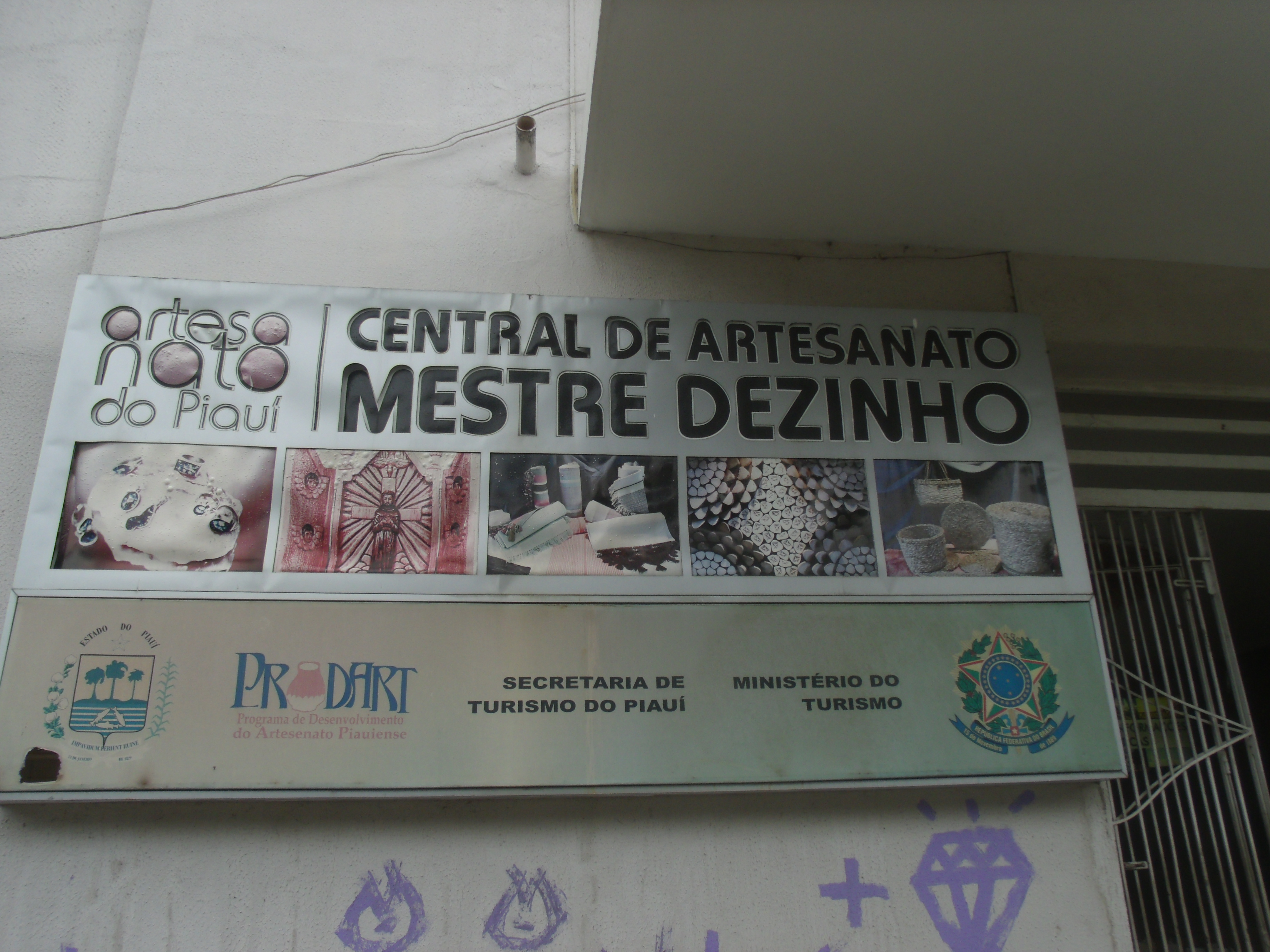 Placaria no fronte da Central de Artesanato Mestre Dezinho, em Teresina.